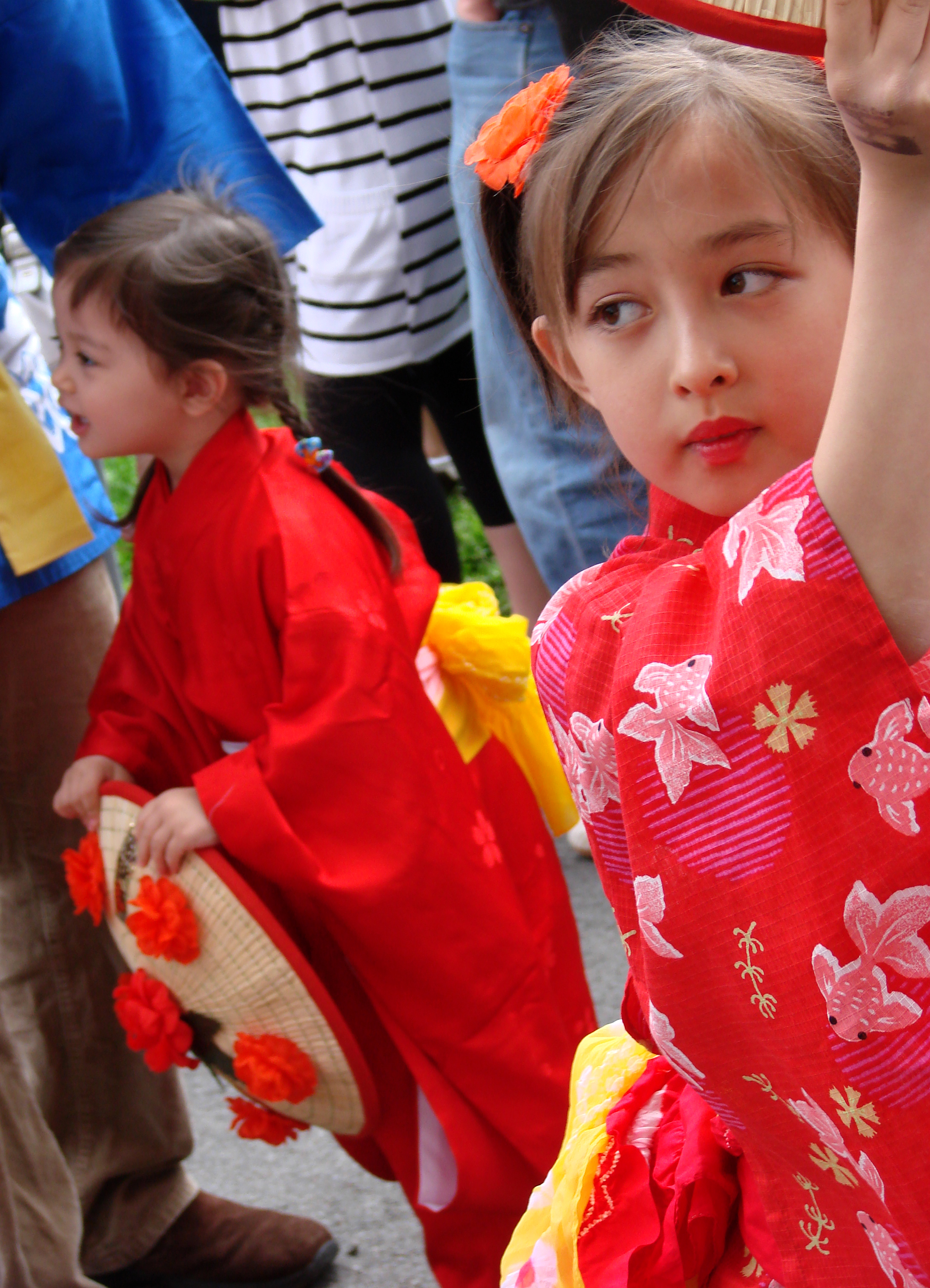 goldfish